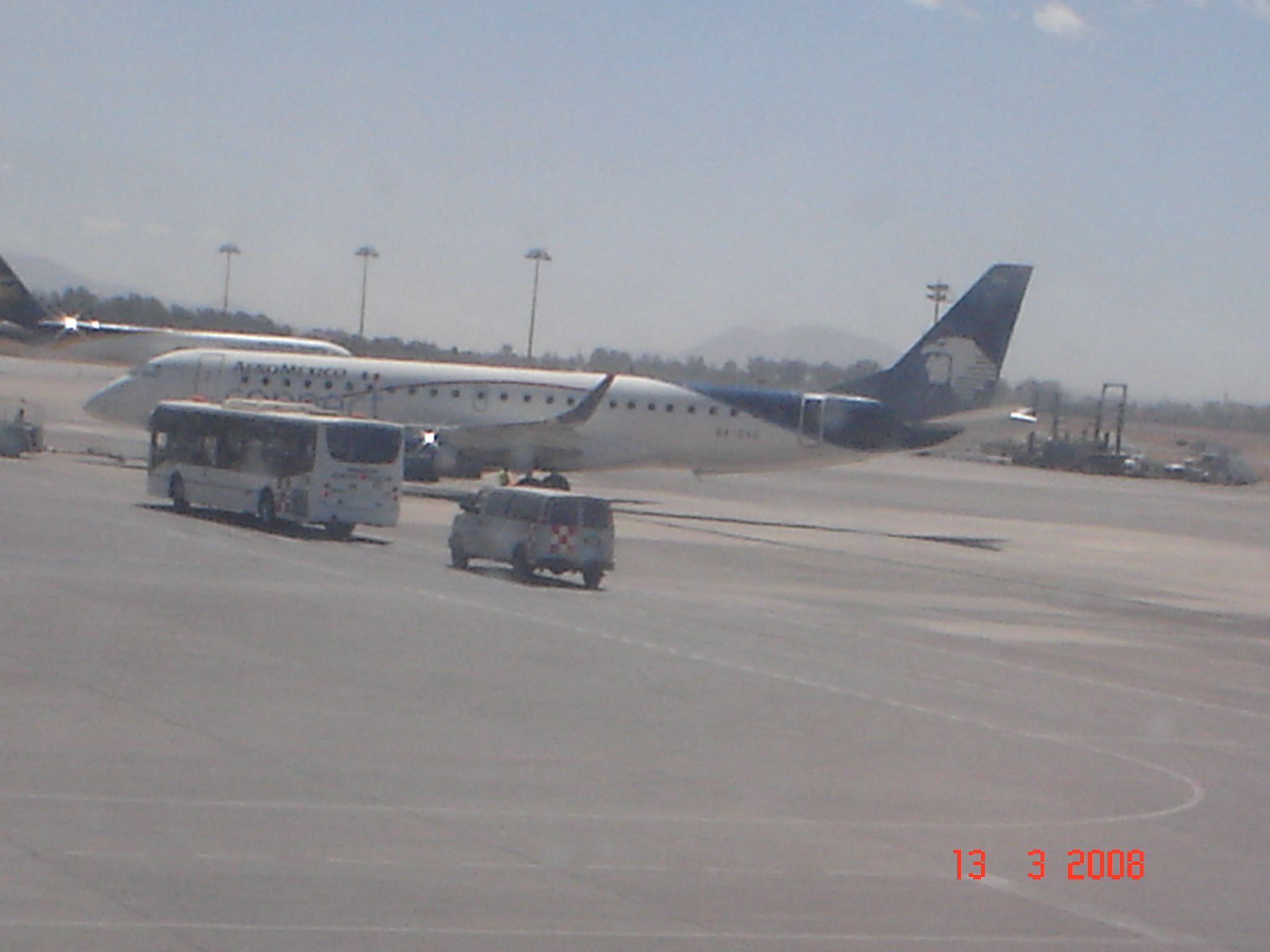 E-190 en el Aeropuerto de Guadalajara